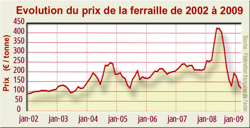 évolution du prix de la ferraille sur 7 ans en France, avec effet de la demande chinoise, puis "crise".